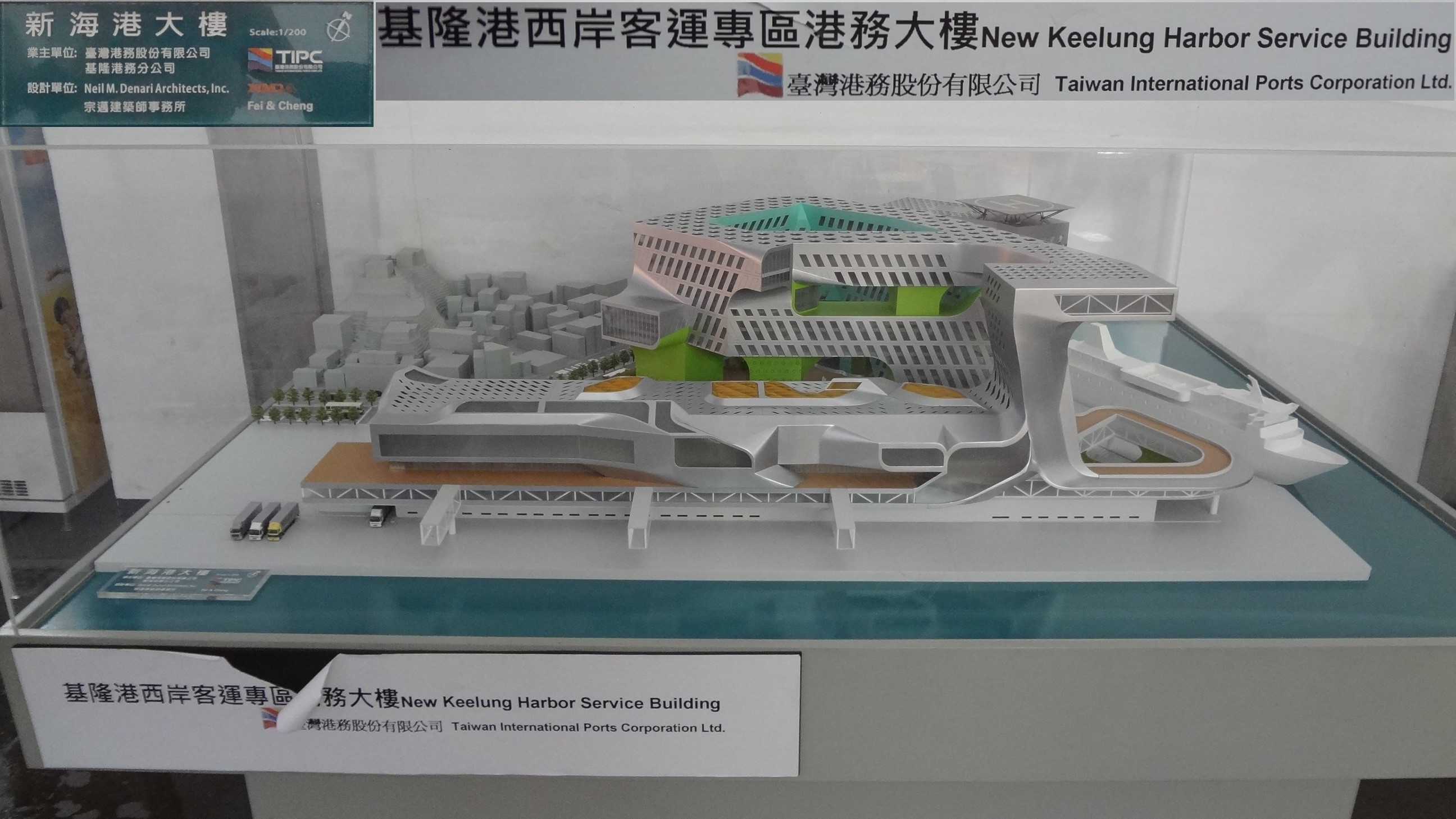 基隆港西岸客運專區港務大樓模型正面，展示於臺灣鐵路管理局基隆車站大廳。